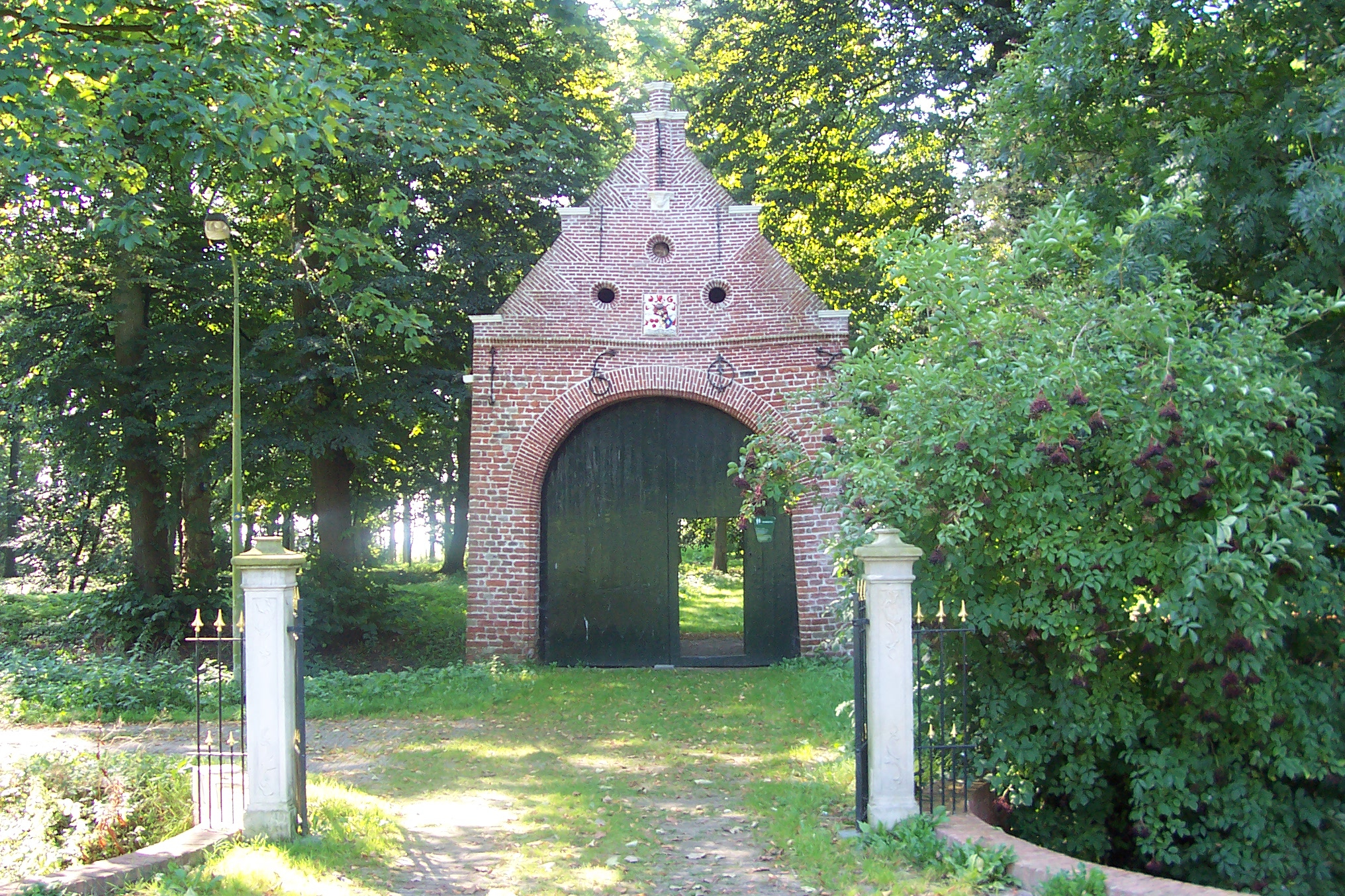 Poarteraarderbosk